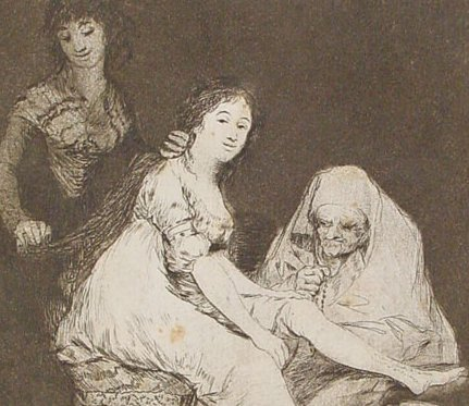 Ruega por ella.-Detalle 1 del Capricho nº 31: Francisco Goya y Lucientes, Pintor de Goya, serie Los Caprichos